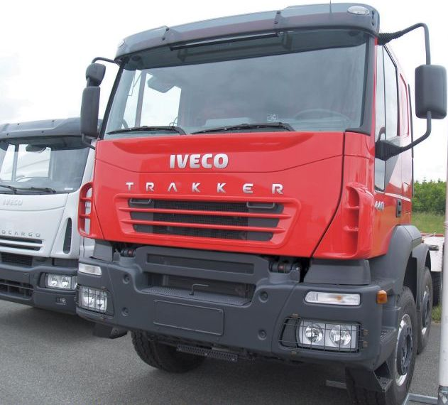 2006 Iveco Trakker